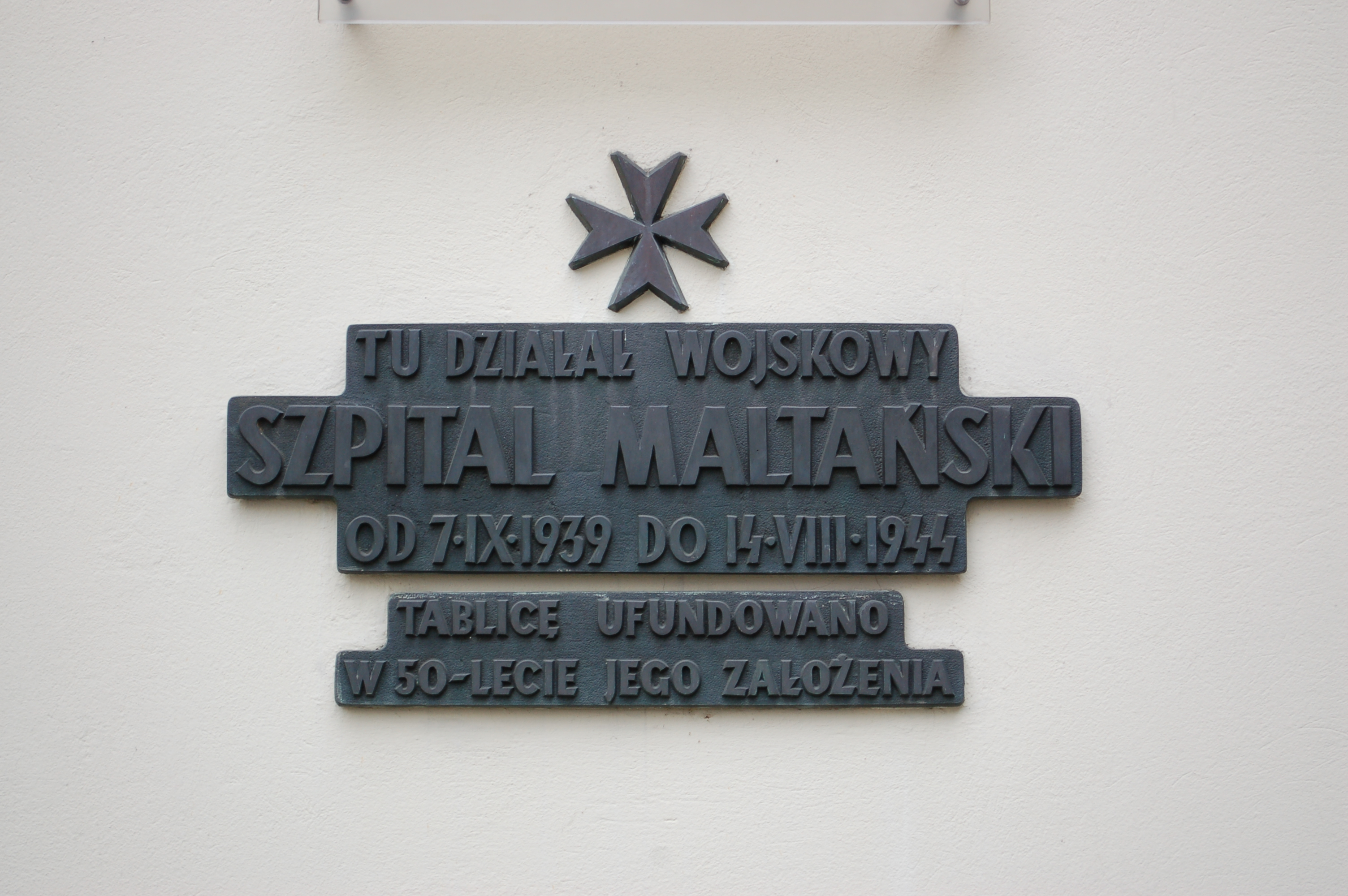 Warschau, Senatorska